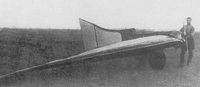 Plane Cheranovsky BICh-3 1926